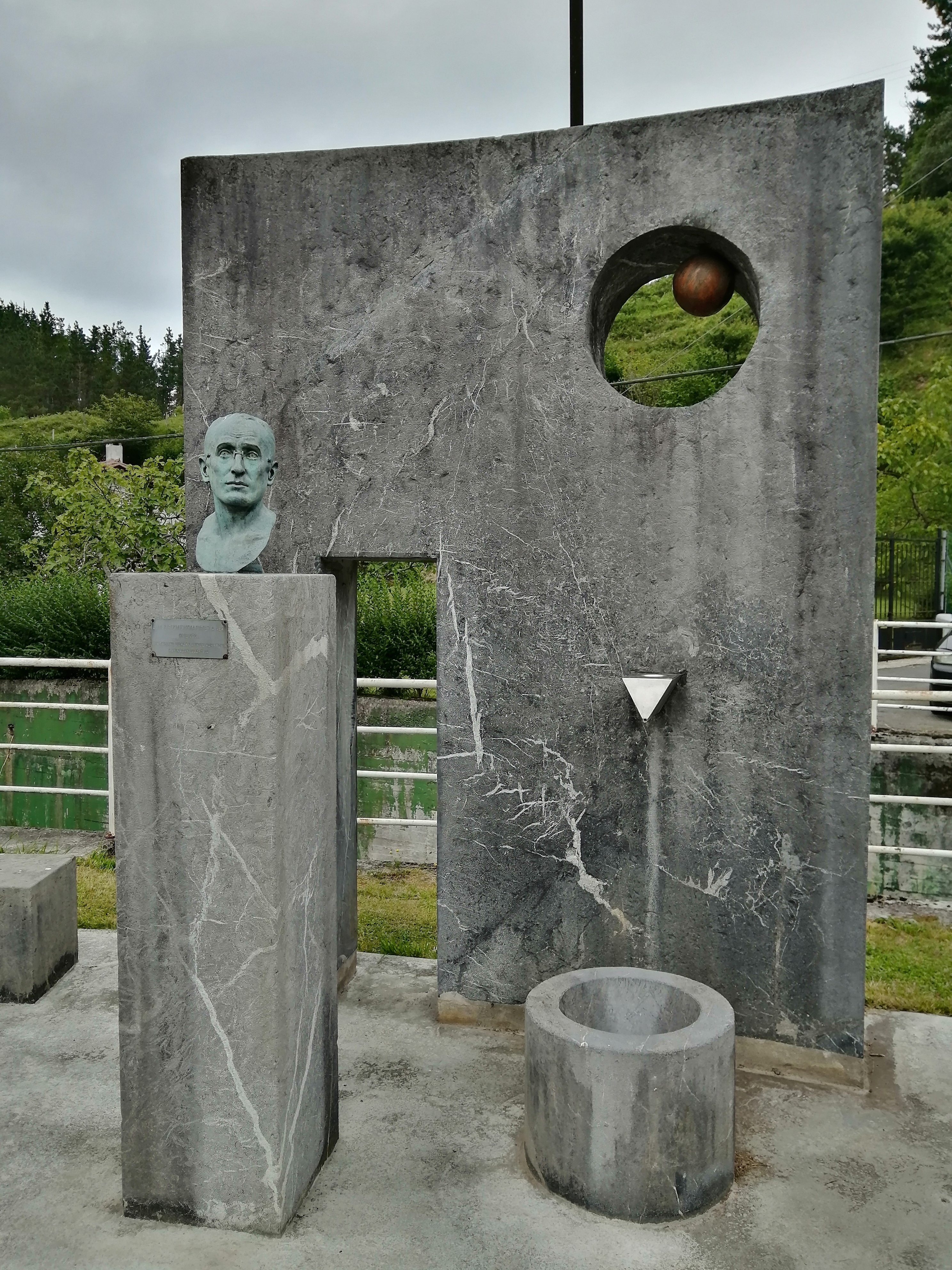 Jose Maria Arizmendiarrietaren omenezko eskultura Barinaga auzoan (Markina-Xemein)